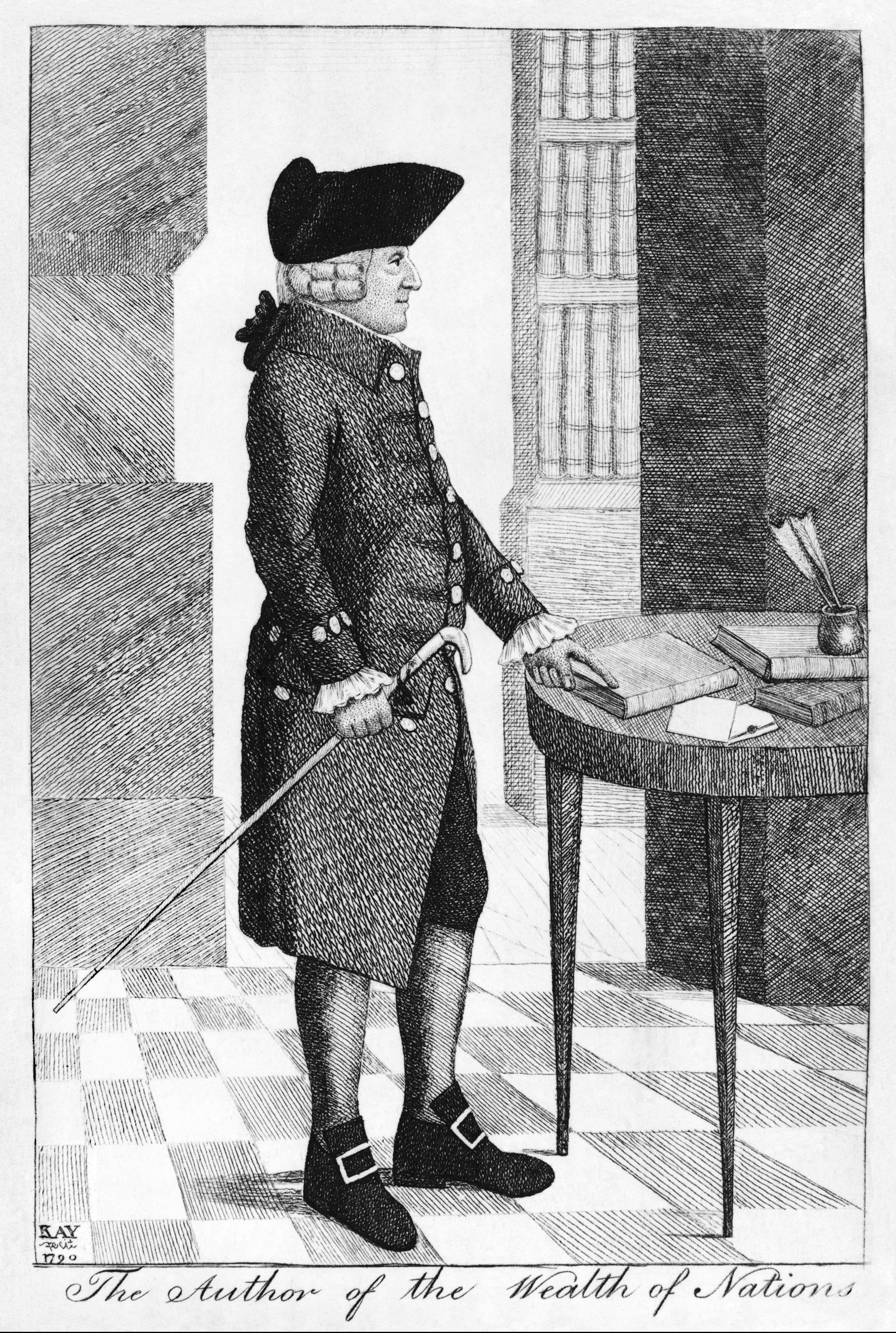 Adam Smith; engraving